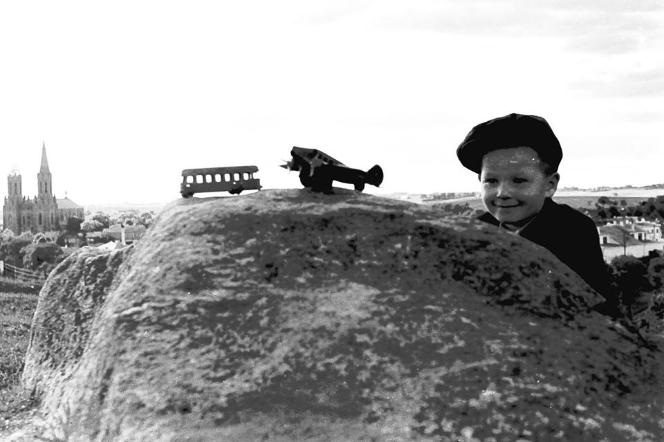 nuotraukoje Izidoriaus Girčio sūnus Vilius, apie 1956 m.